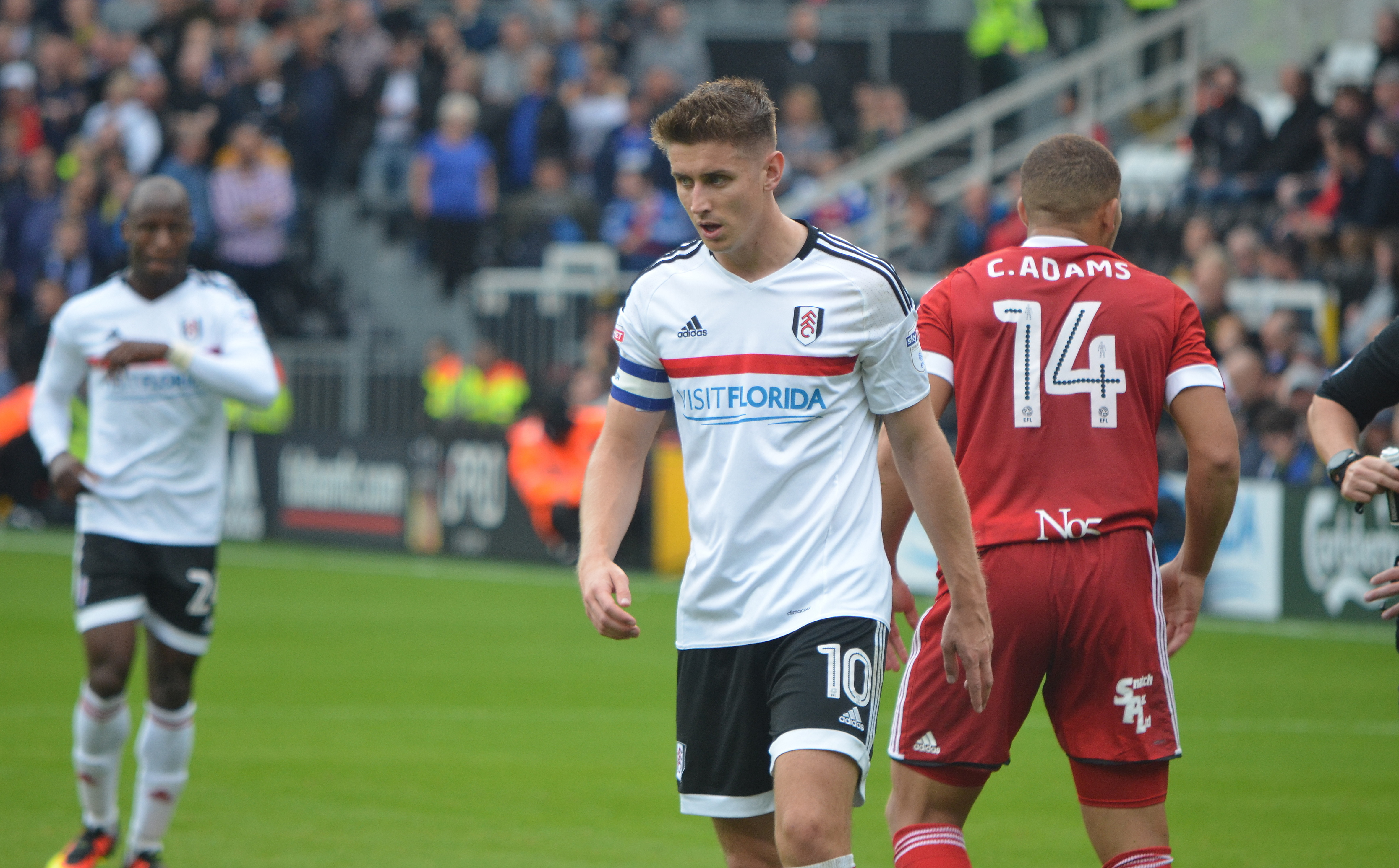 Tom Cairney (Fulham FC)